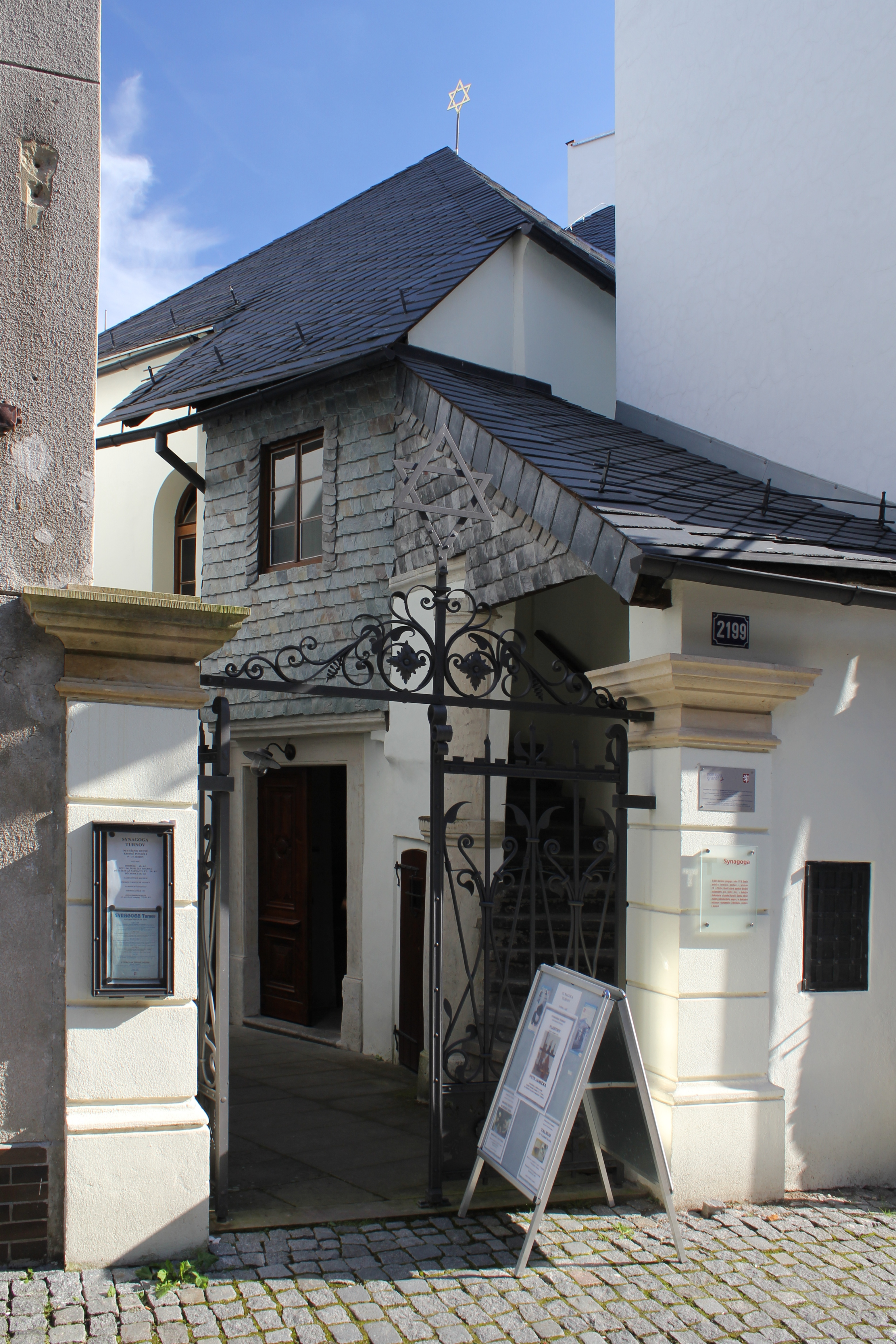 Turnovská synagoga